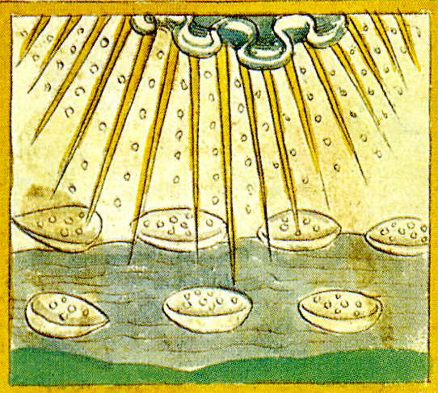 Illustrazione dal trattato De Alchimia pubblicato a Leida nel 1526: rugiada celeste che insemina il mondo.